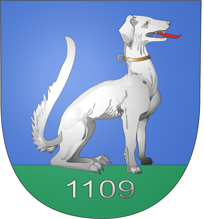 CoA Psie Pole, z datą/with year.